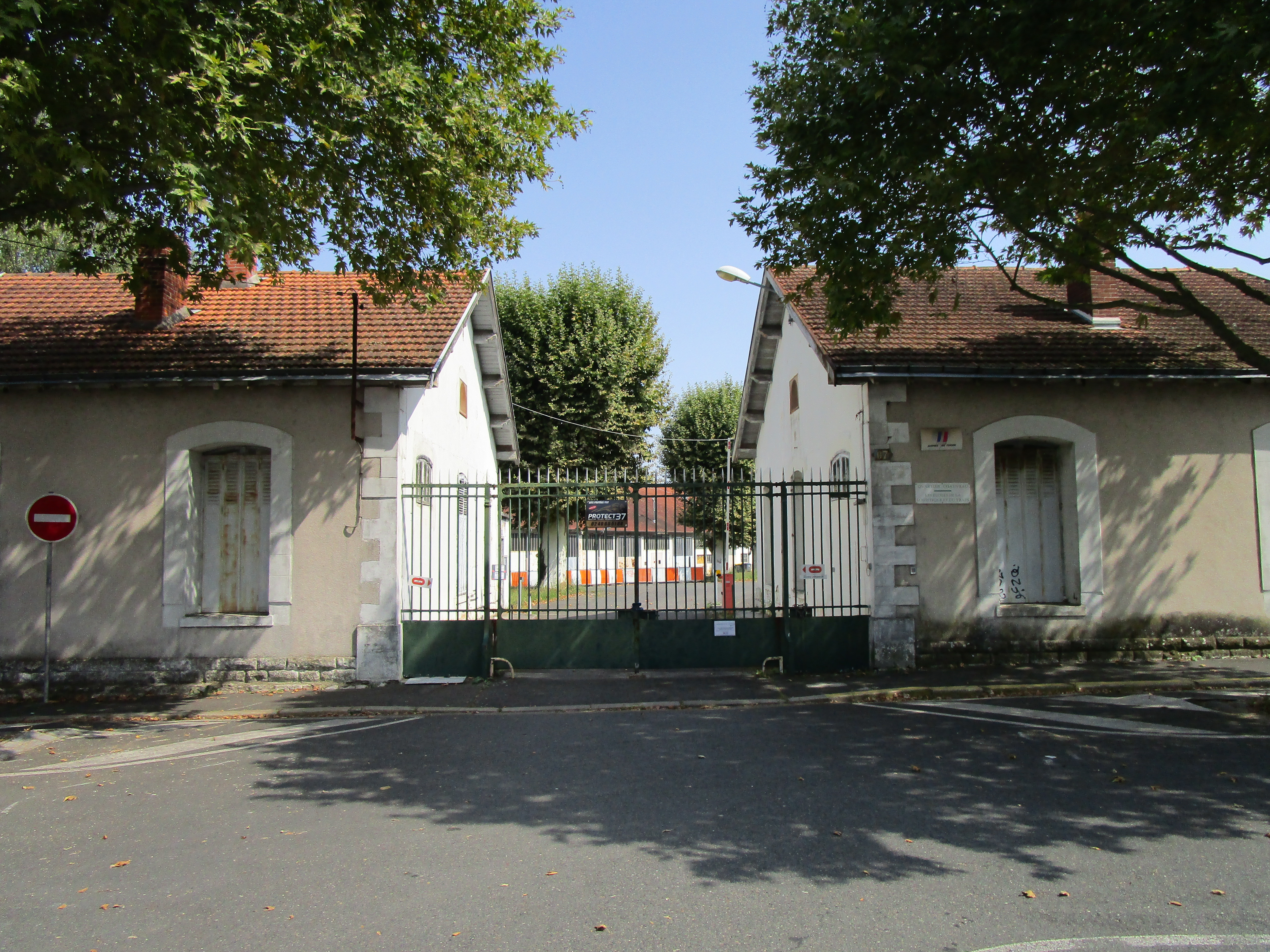 L'ancienne caserne Chauveau de Tours, qui accueillait l'école de la logistique et du train